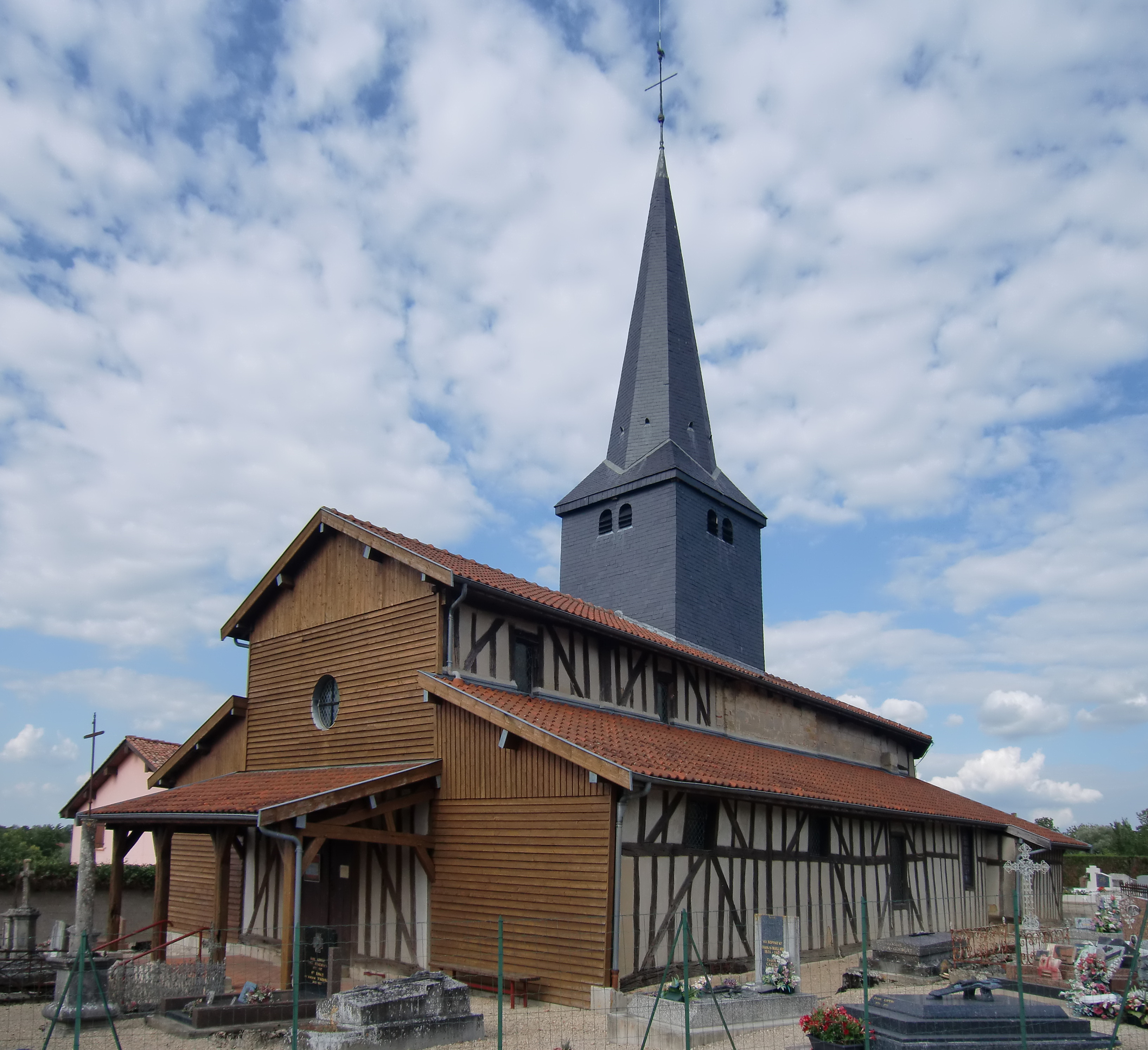 Eglise Saint Maurice d'Arrigny (Marne - Champagne - France) édifice à pans de bois du pays du Der